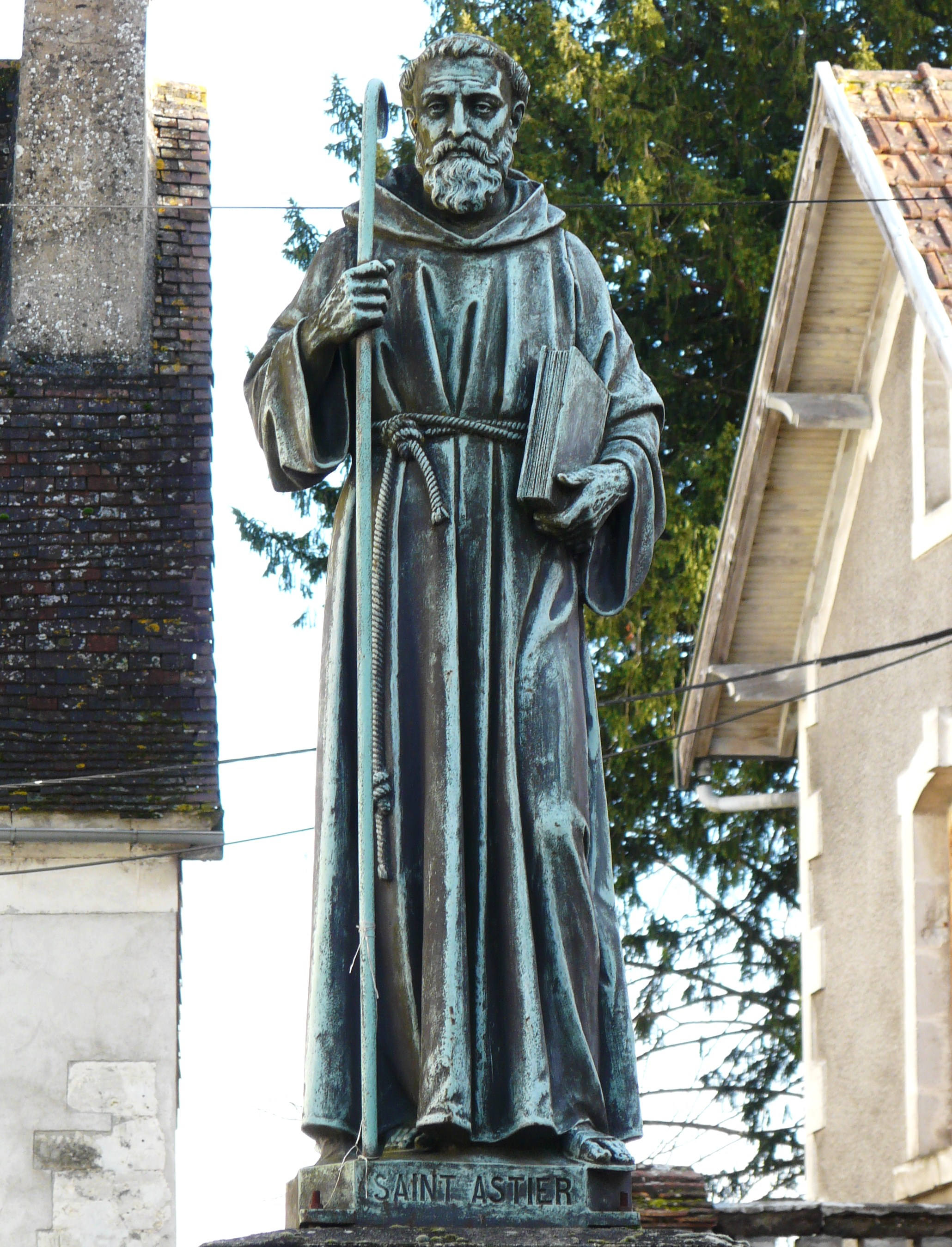 Statue représentant l'ermite saint Astier, Saint-Astier, Dordogne, France